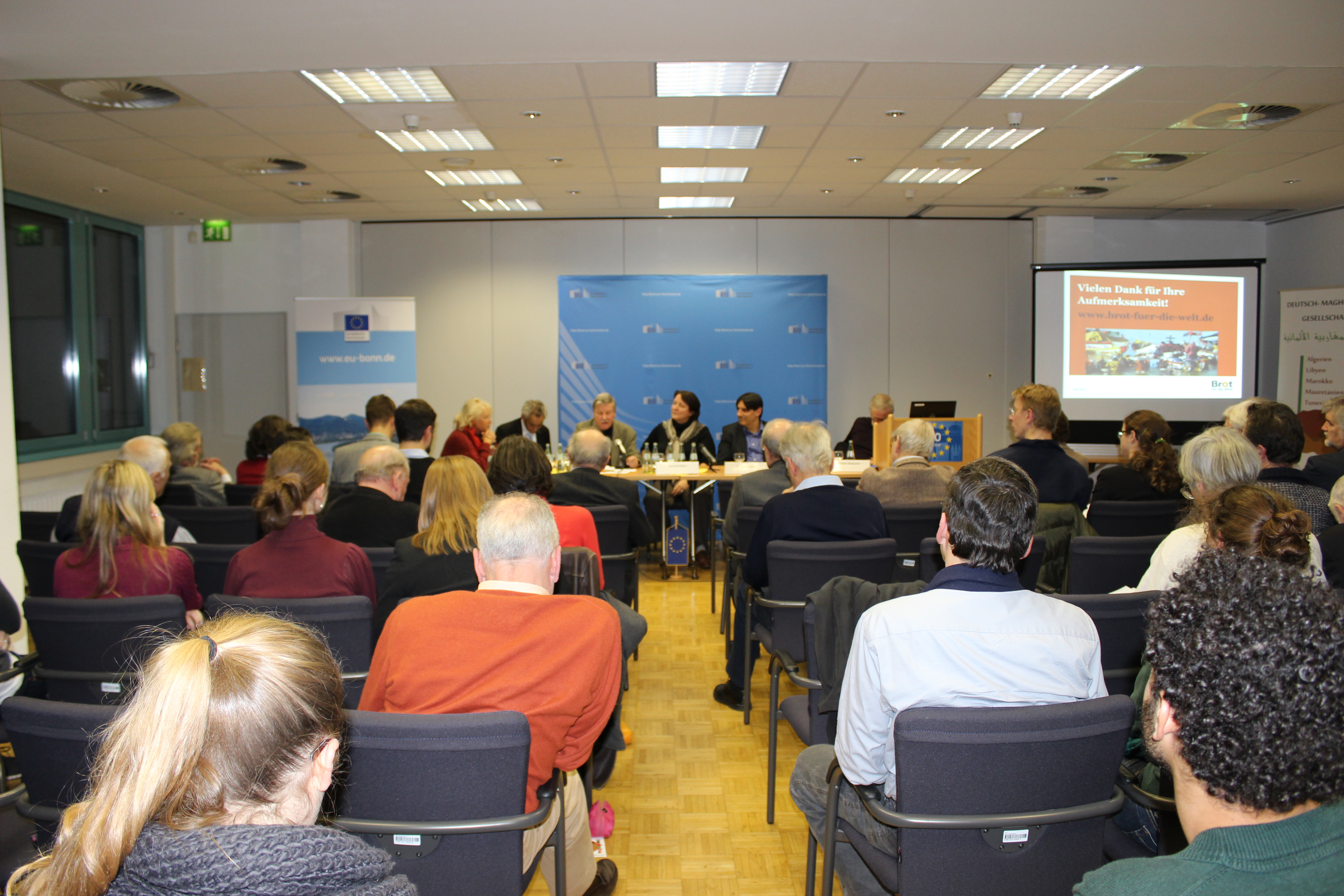 Veranstaltung Fischerei in Nordafrika